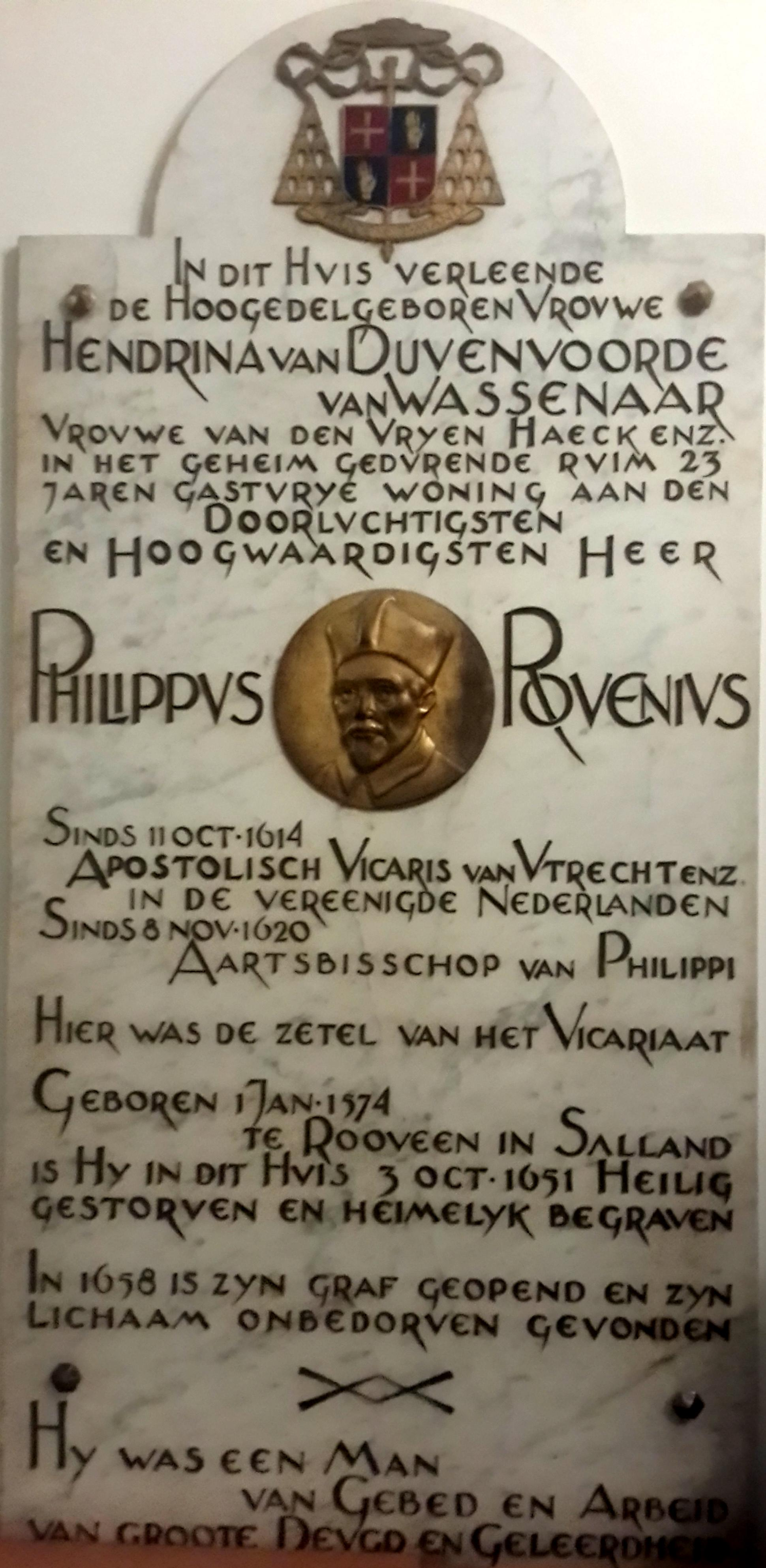 Gedenksteen Philippus Rovenius, Kathedrale Koorschool, Plompetorengracht 5, Utrecht, Nederland